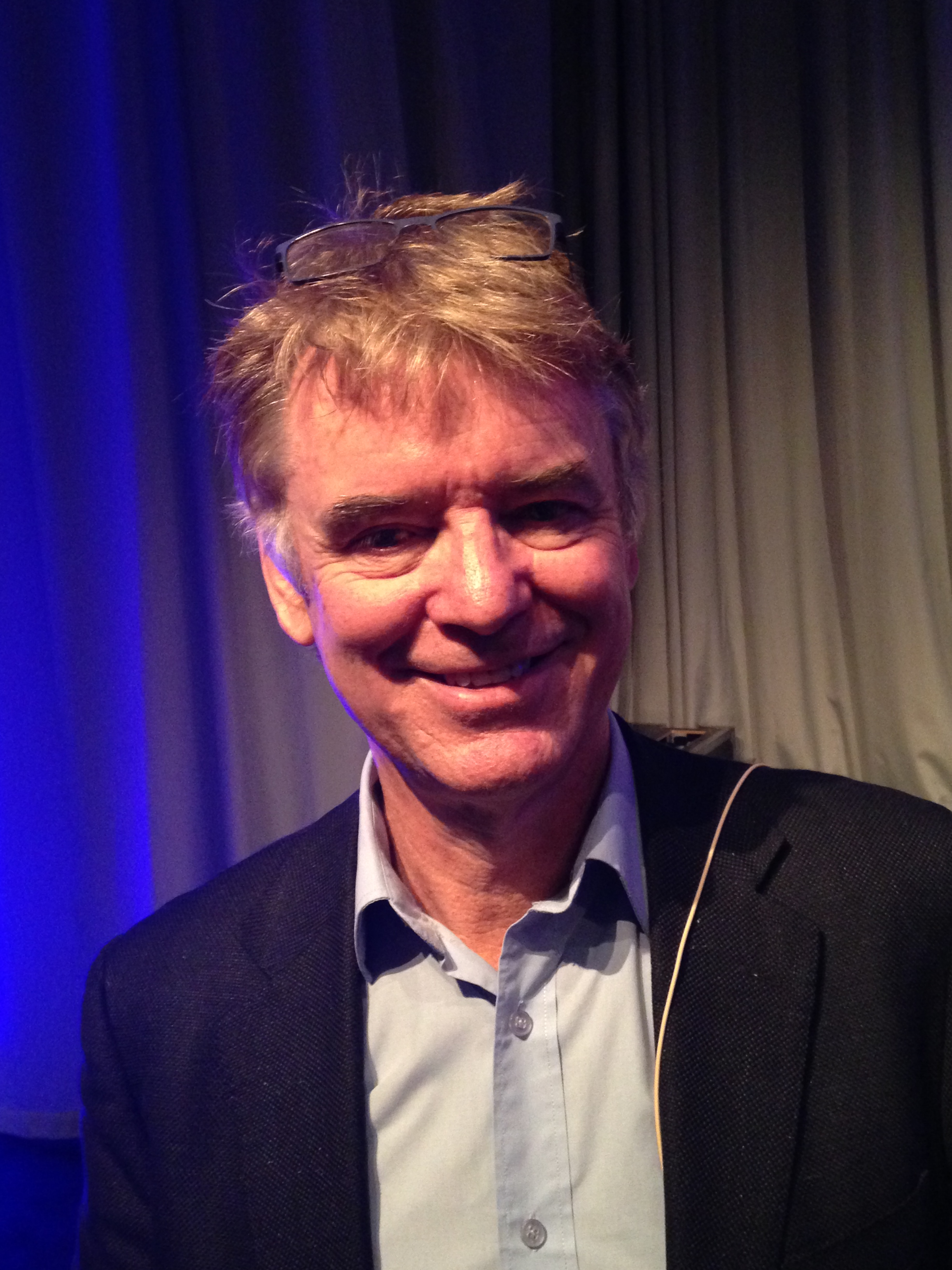 Hattie i Göteborg 21 nov 2014